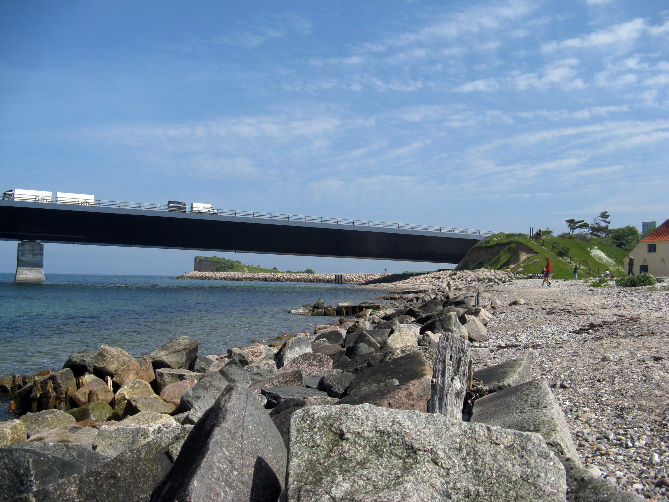 Storebæltsbroens landfæste ved Halskov Odde set mod nord